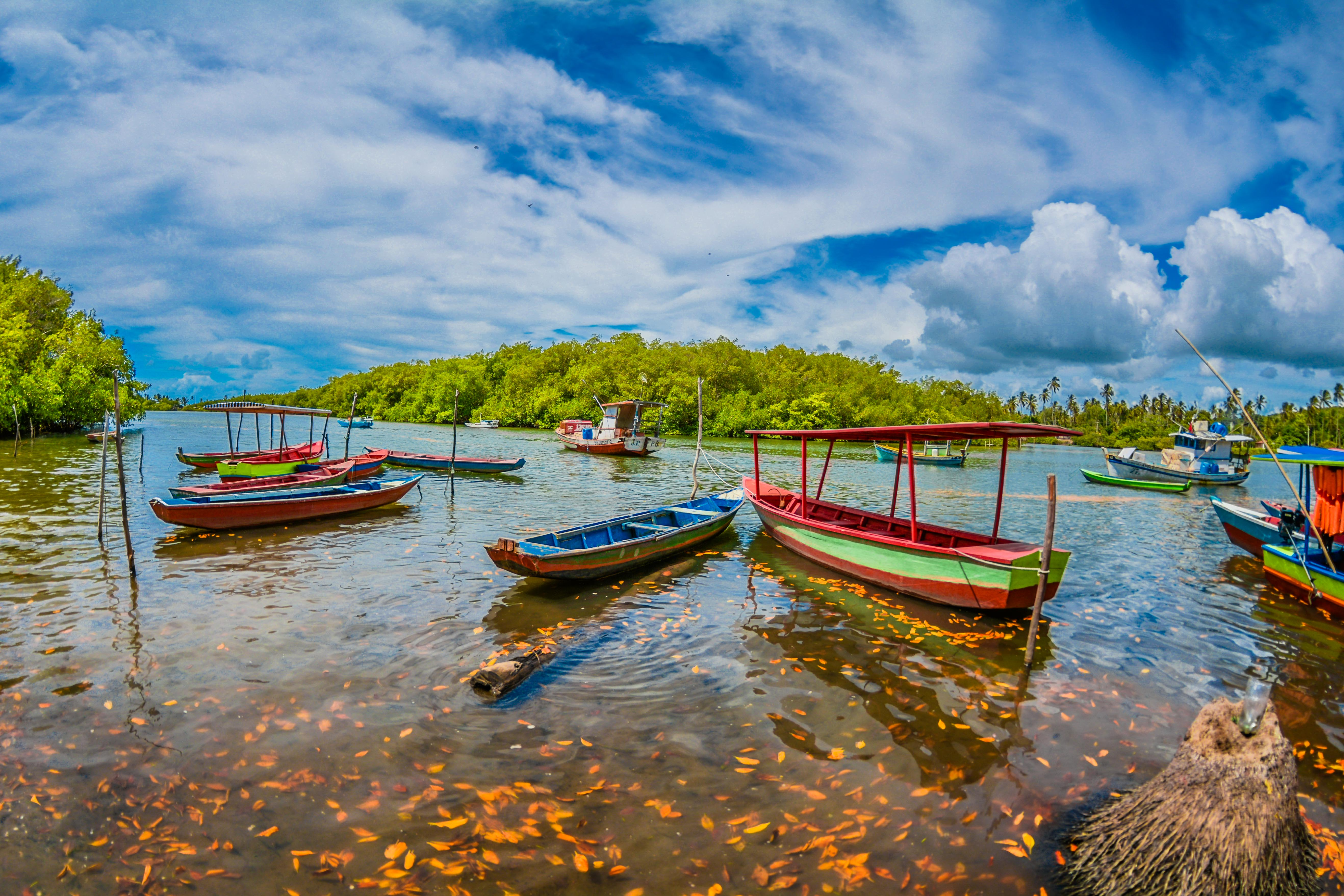 Aldeia Indígena.